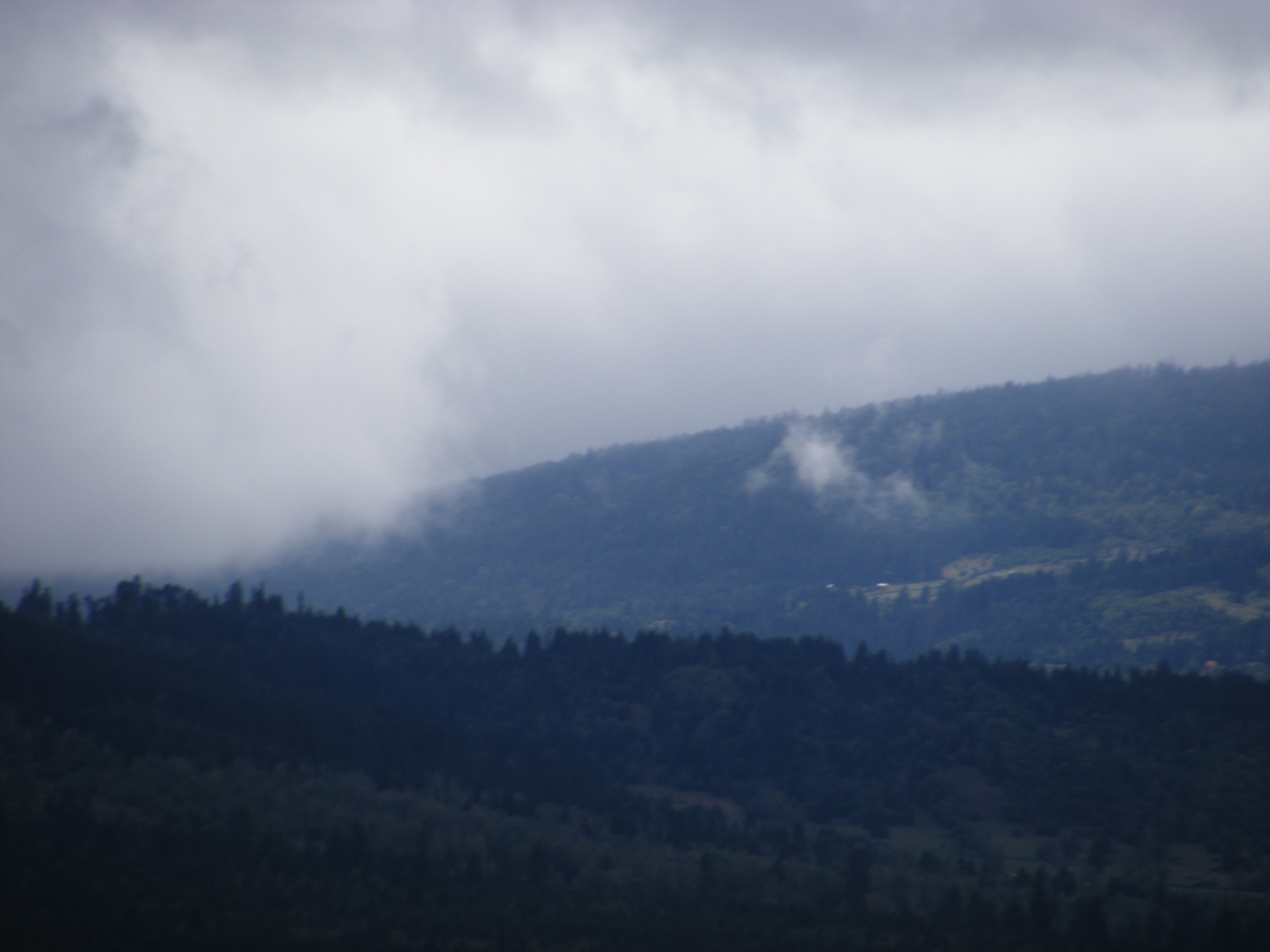 Marosfői hegy, Erdély